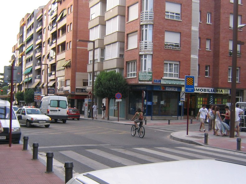 Ciclista circulando integradamente por la calle del Amparo de Guadalajara (España).